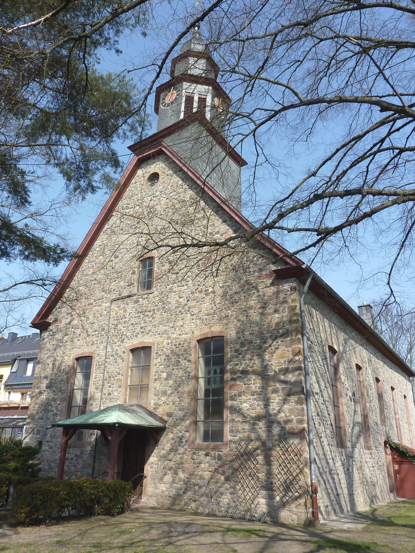 Frankfurt am Main, Stadtteil Praunheim: Die evangelische Auferstehungskirche, eine barocke Saalkirche aus dem 18. Jahrhundert. Die Pfarrkirche im damals selbständigen Dorf Praunheim wurde von 1770 bis 1773 anstelle eines durch Brand zerstörten Vorgängerbaues errichtet. Das Foto zeigt eine Außenansicht der Kirche von Süden, vom Kirchhof aus gesehen